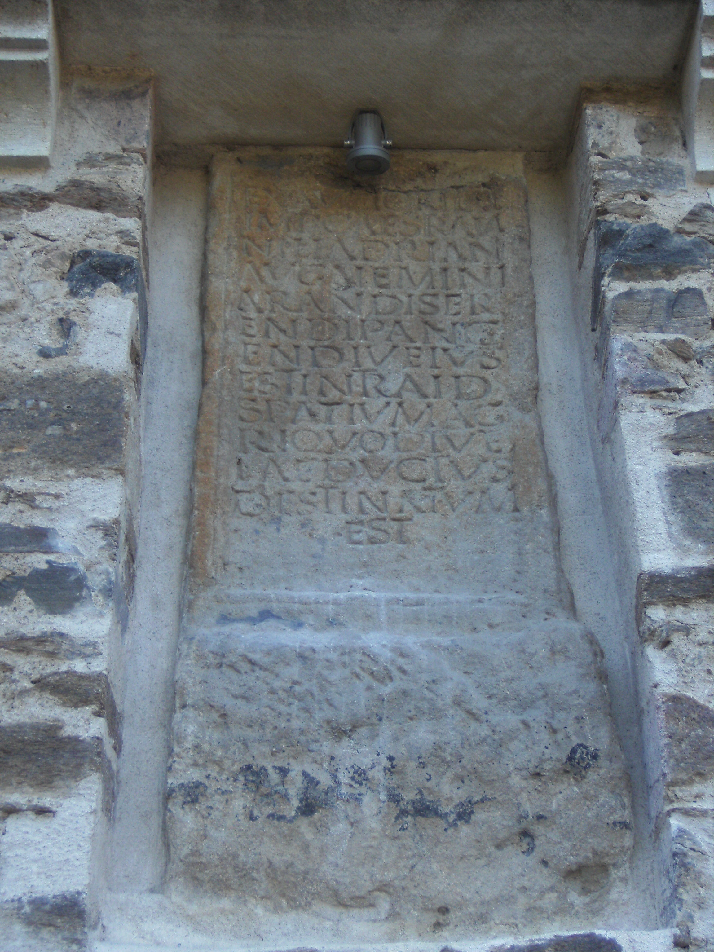 Aqueduc du Gier. Pierre de Chagnon. CIL XIII, 1623. Il est écrit : EX AVCTORITATE IMP(eratoris) CAES(aris) TRAIA NI HADRIANI AVG(usti) NEMINI ARANDI SER ENDI PANG ENDIVE IVS EST INTRA ID SPATIUM AG RI QVOD TVTE LAE DVCTVS DESTINATVM EST